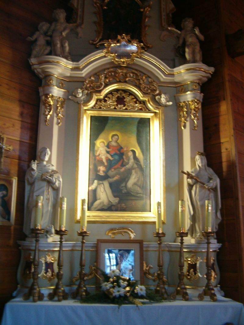 Ołtarz Św. Anny w kościele parafialnym pw. Św. Tekli w Dobrzycy, powiat pleszewski, woj. wielkopolskie.